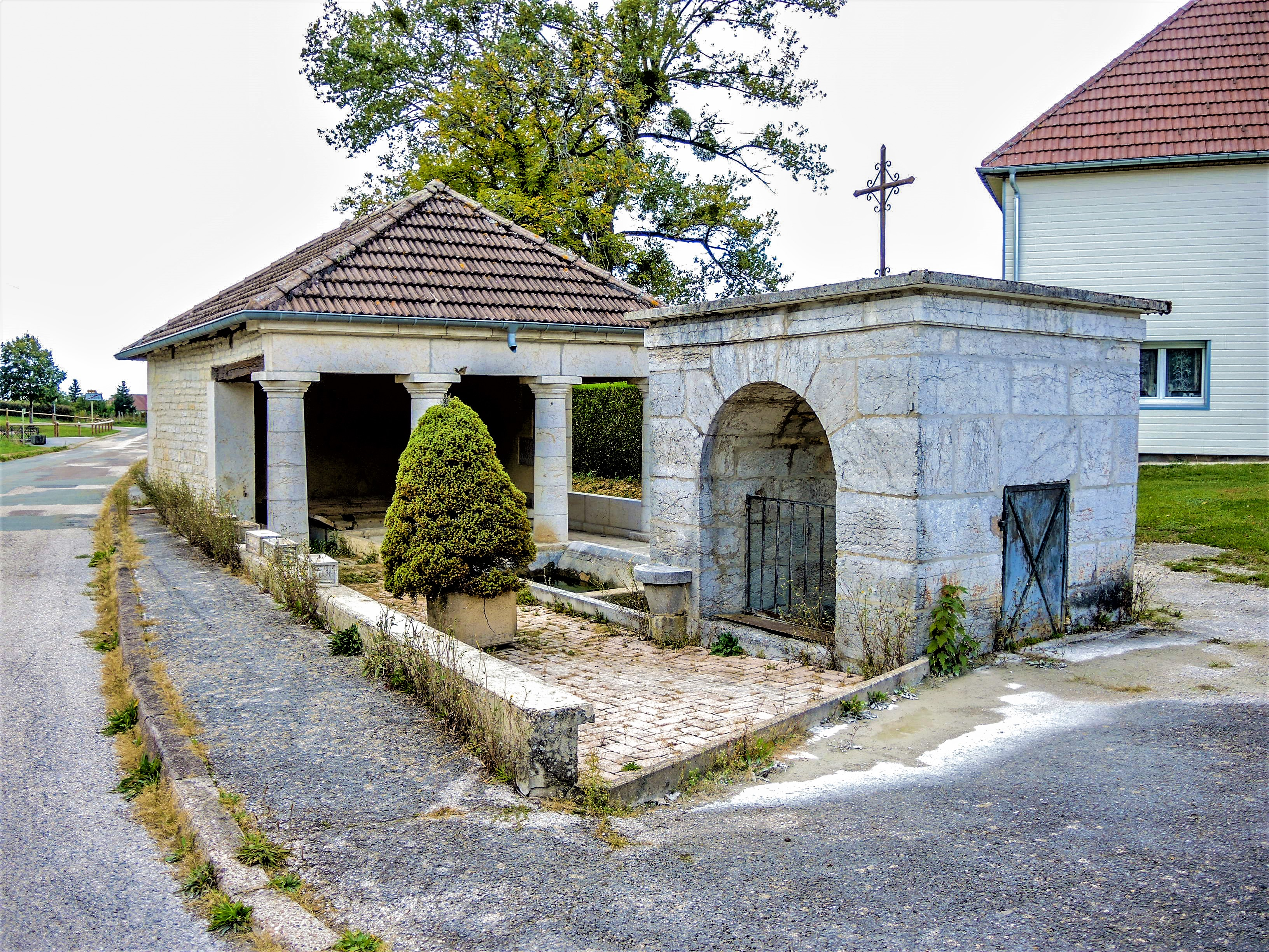 Fontaine-lavoir couverte.